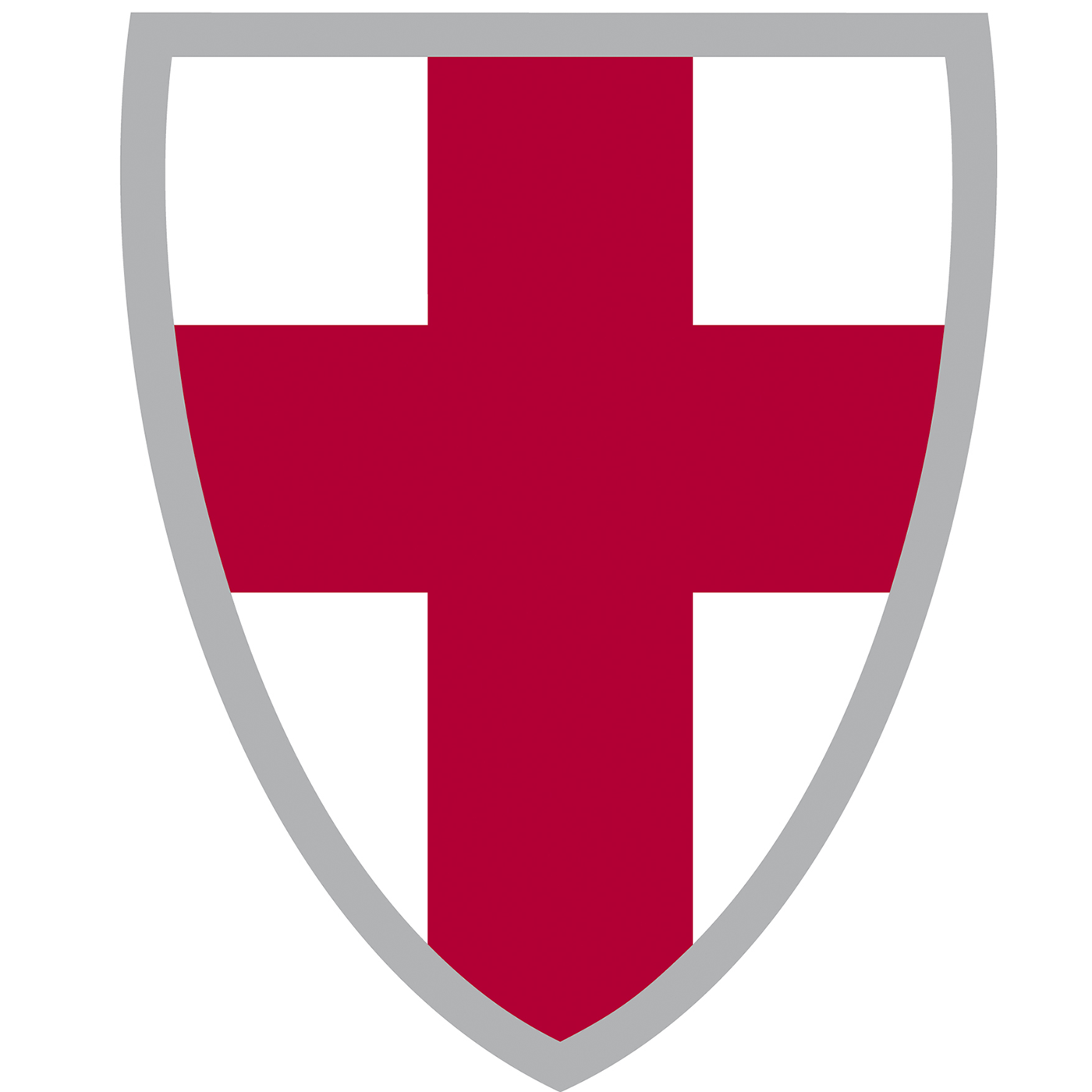 Das Wappen des Bistums Trier: Das rote Bistums-Kreuz auf einem Wappenschild